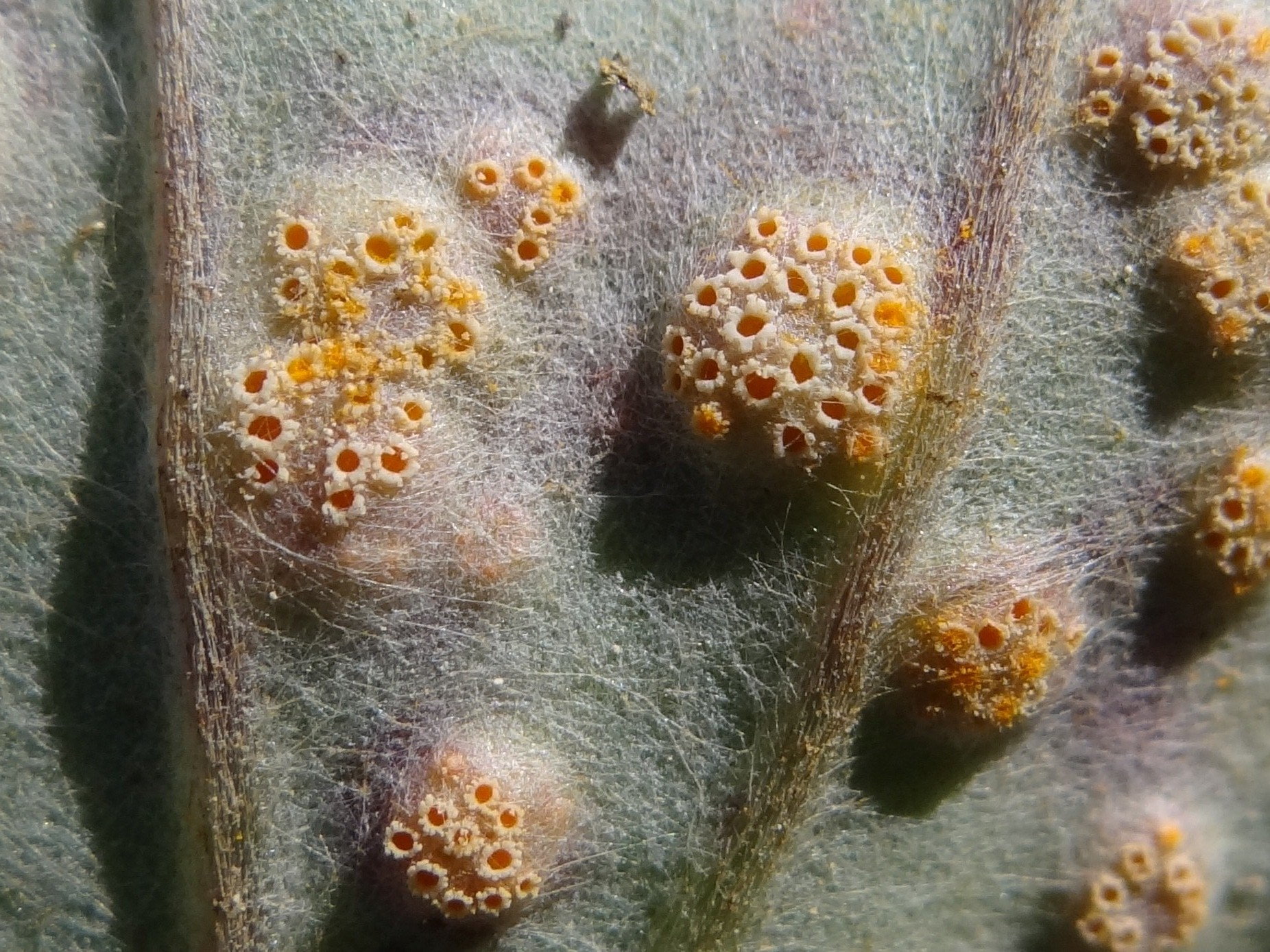 Puccinia poarum on Tussilago farfara